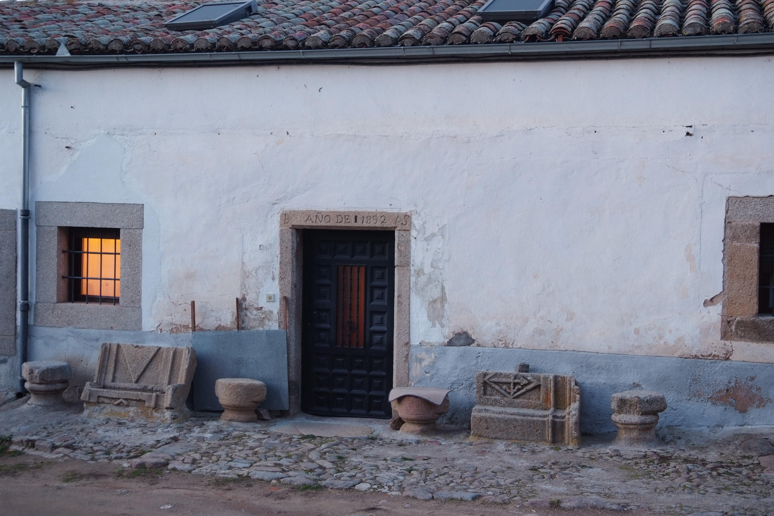 Entrada de casa en Aldeanueva de Santa Cruz (Ávila; España)